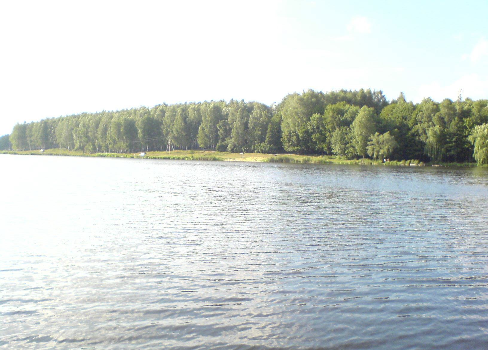 Пруд Перекошка на реке Люботинке в Харьковской области